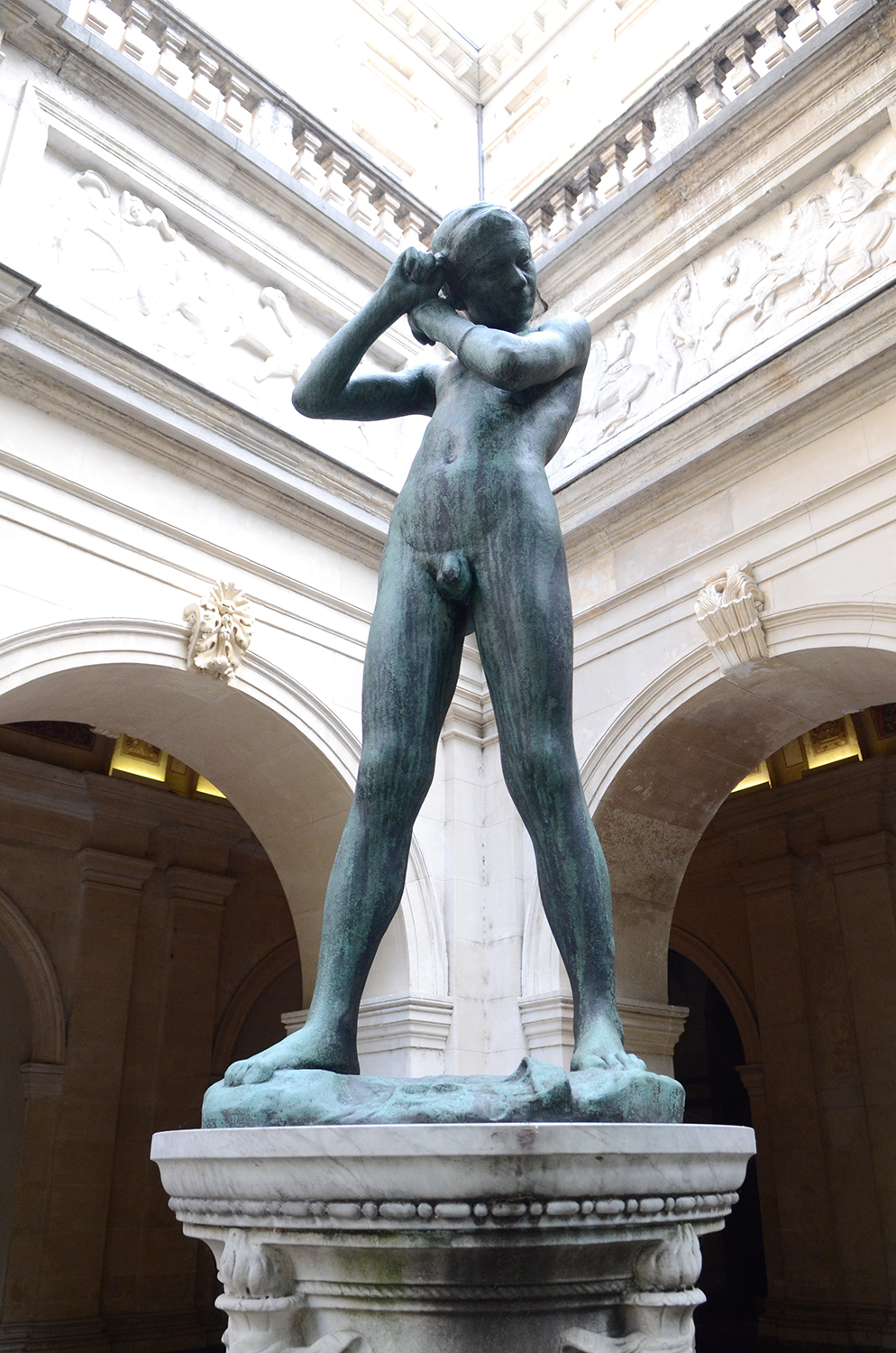 Jeune athlète, Jean Larrivé (Lyon 1875 ; Lyon 1928), bronze, 1909, acquis de l’auteur, Villa Medicis à Rome Cette sculpture représentant un jeune athlète attachant une bandelette autour de sa tête est achetée en 1909 à l’auteur et placée dès 1911 dans le jardin, sur un autel antique dans l’angle Nord-Est, en pendant de l’Age d’Airain de Rodin. Lorsque l’artiste réalise cette œuvre, il est pensionnaire à la Villa Médicis, à Rome. Cette sculpture est donc imprégnée de l’influence des styles gréco-romains.